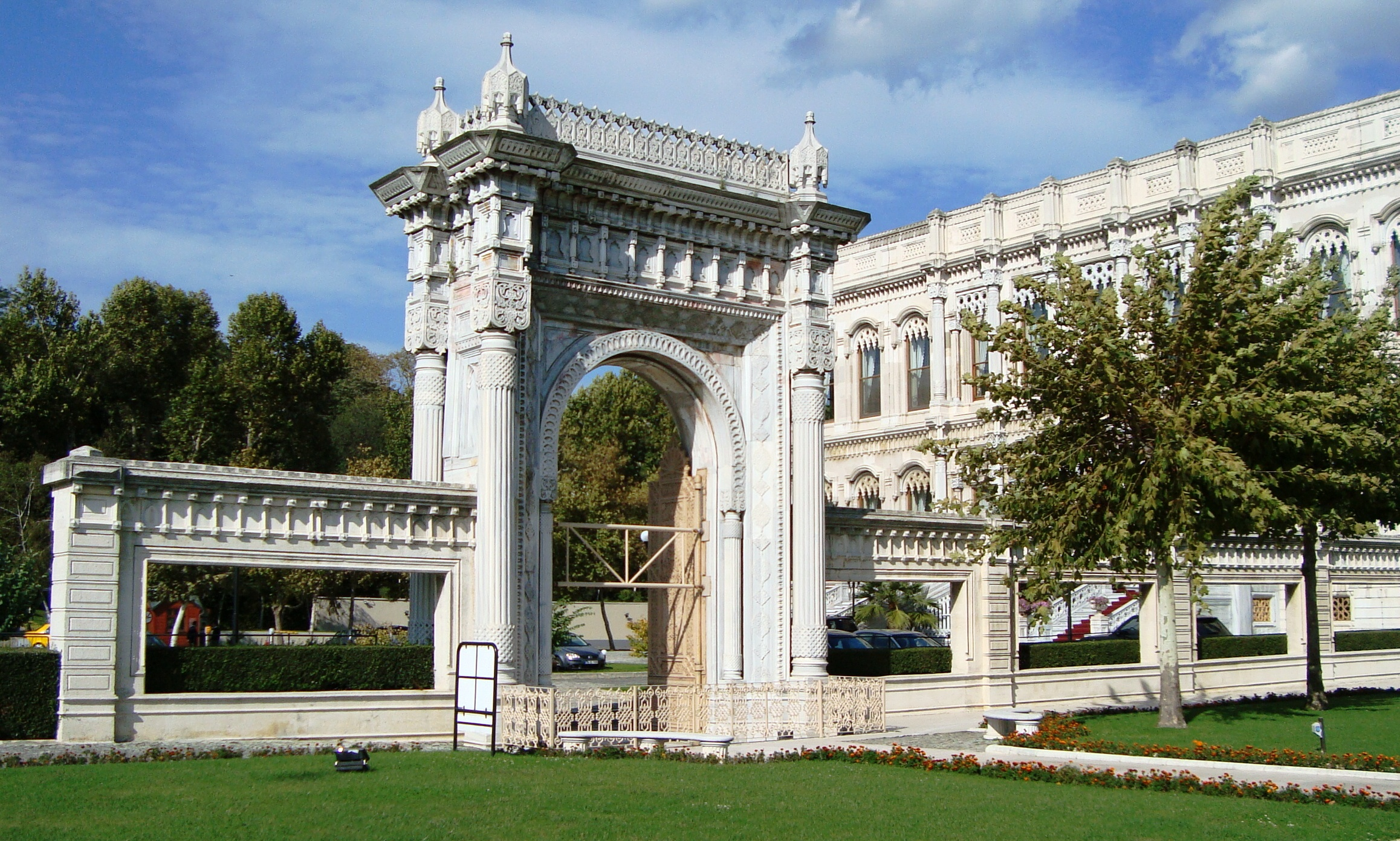 istanbul-çırağan palace-bosphour